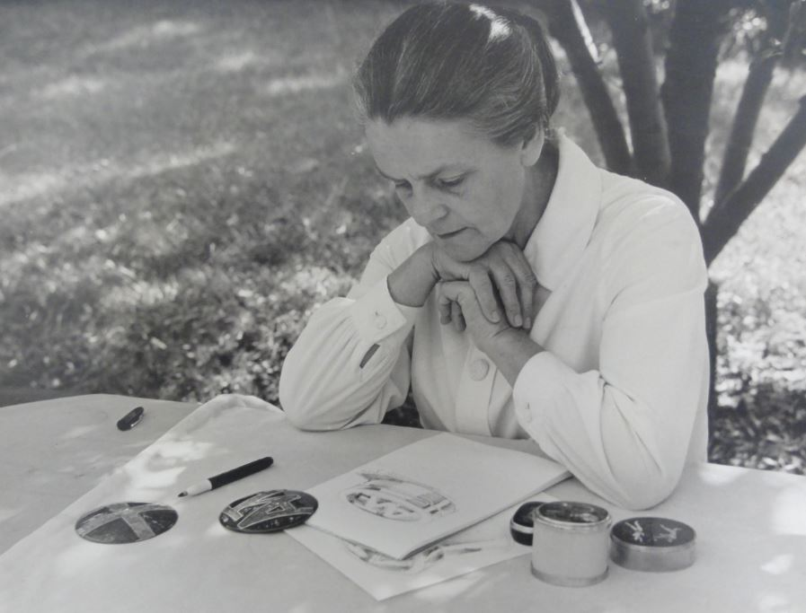 Das Foto zeigt die Emailkünstlerin, Goldschmiedin und Grafikerin Margarete Seeler (1909–1996) bei der Arbeit.